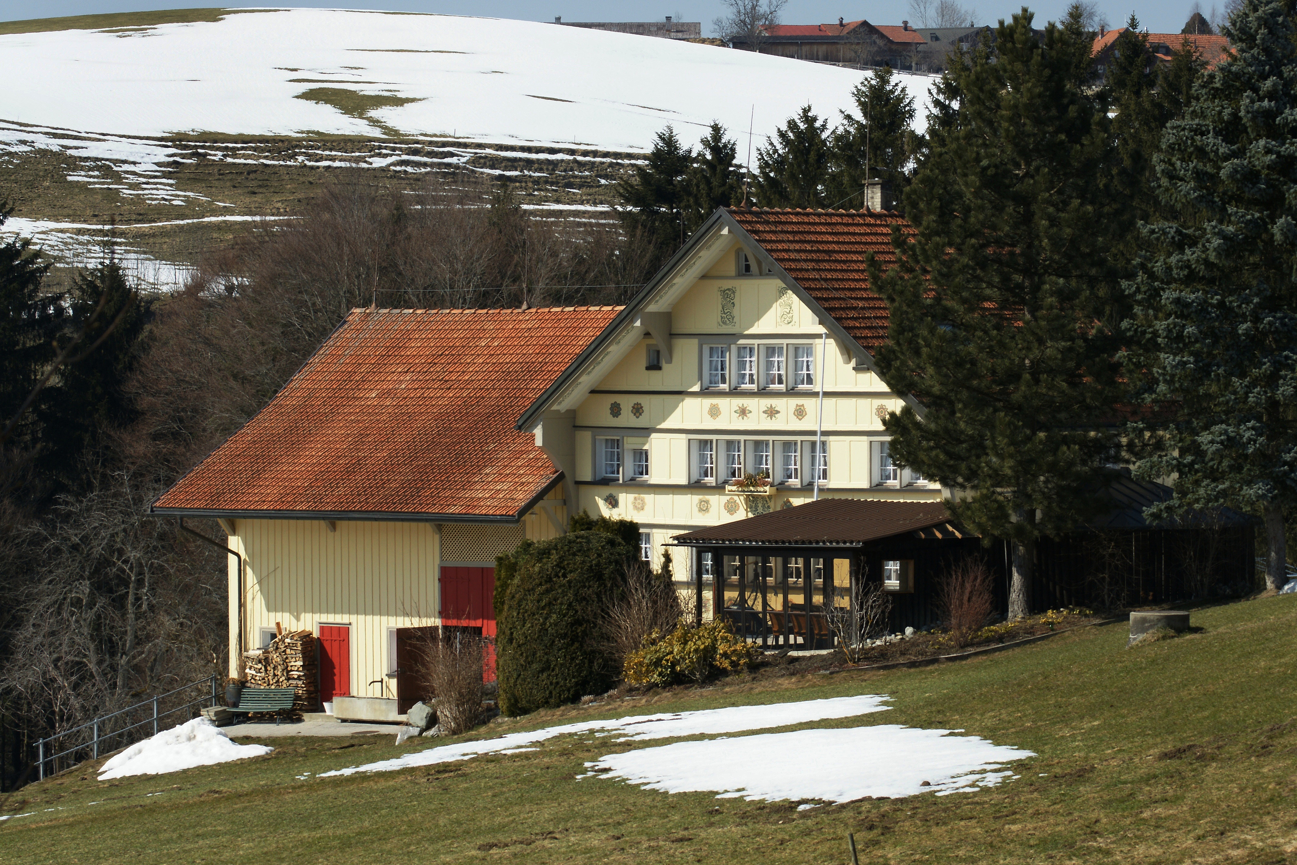 Haus Stampf in der Parzelle Morgenlicht in Trogen im Kanton Appenzell Ausserrhoden.